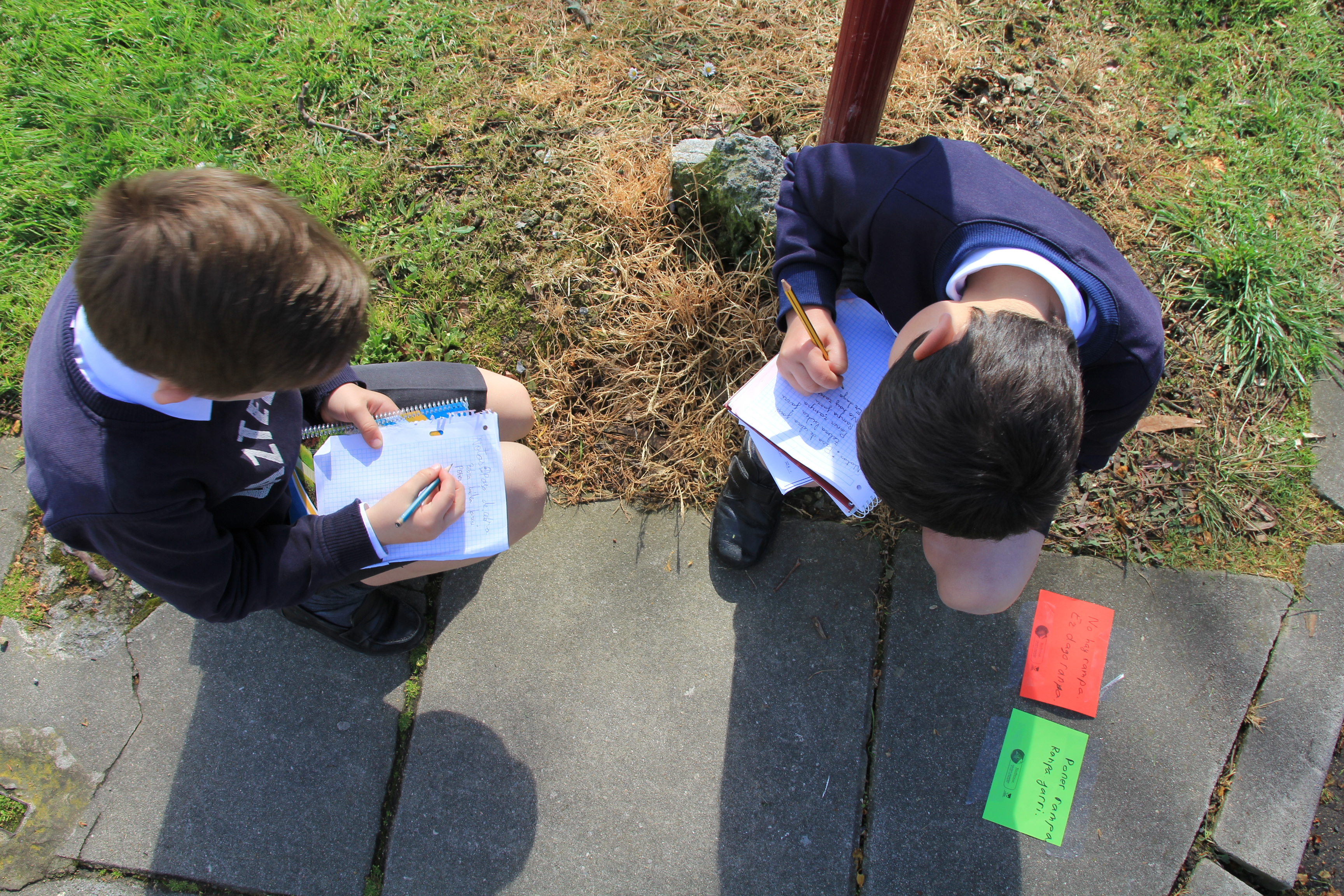 Leioaztar batzuk herria hobetzeko asmoz txartela berdeak eta gorriak jarri zituzten herriko hainbat toki publikotan.